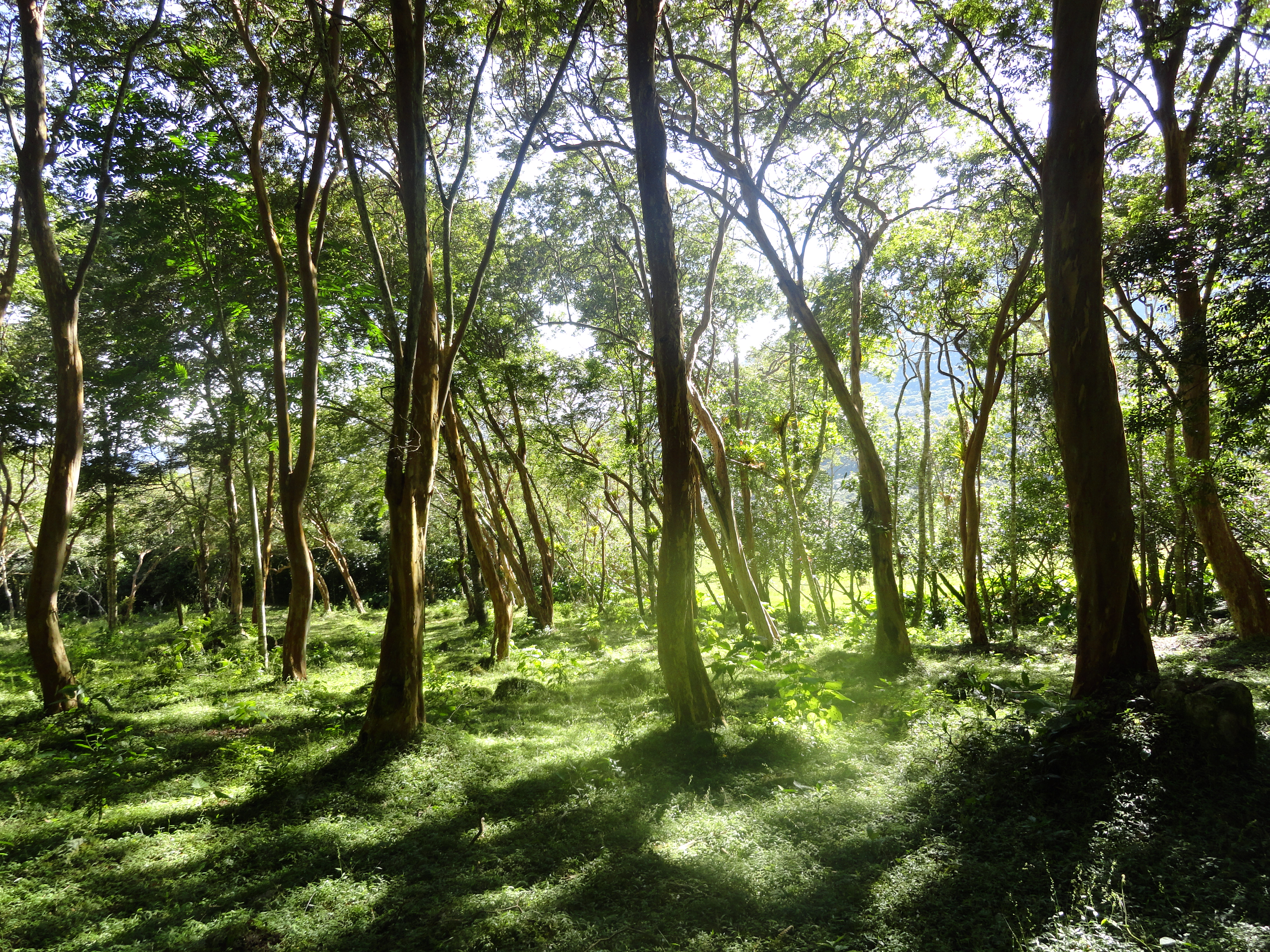 Un bonito bosque a contraluz al que se puede llegar por los caminos rurales en las montañas de Borotá, en el estado Táchira.